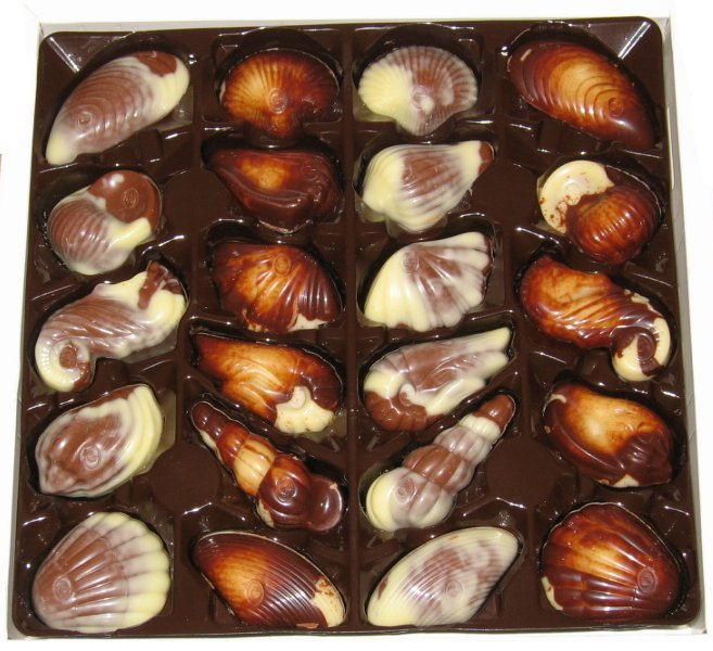 Meeresfrüchte (Belgische Pralinen) selbst fotografiert, Februar 2006